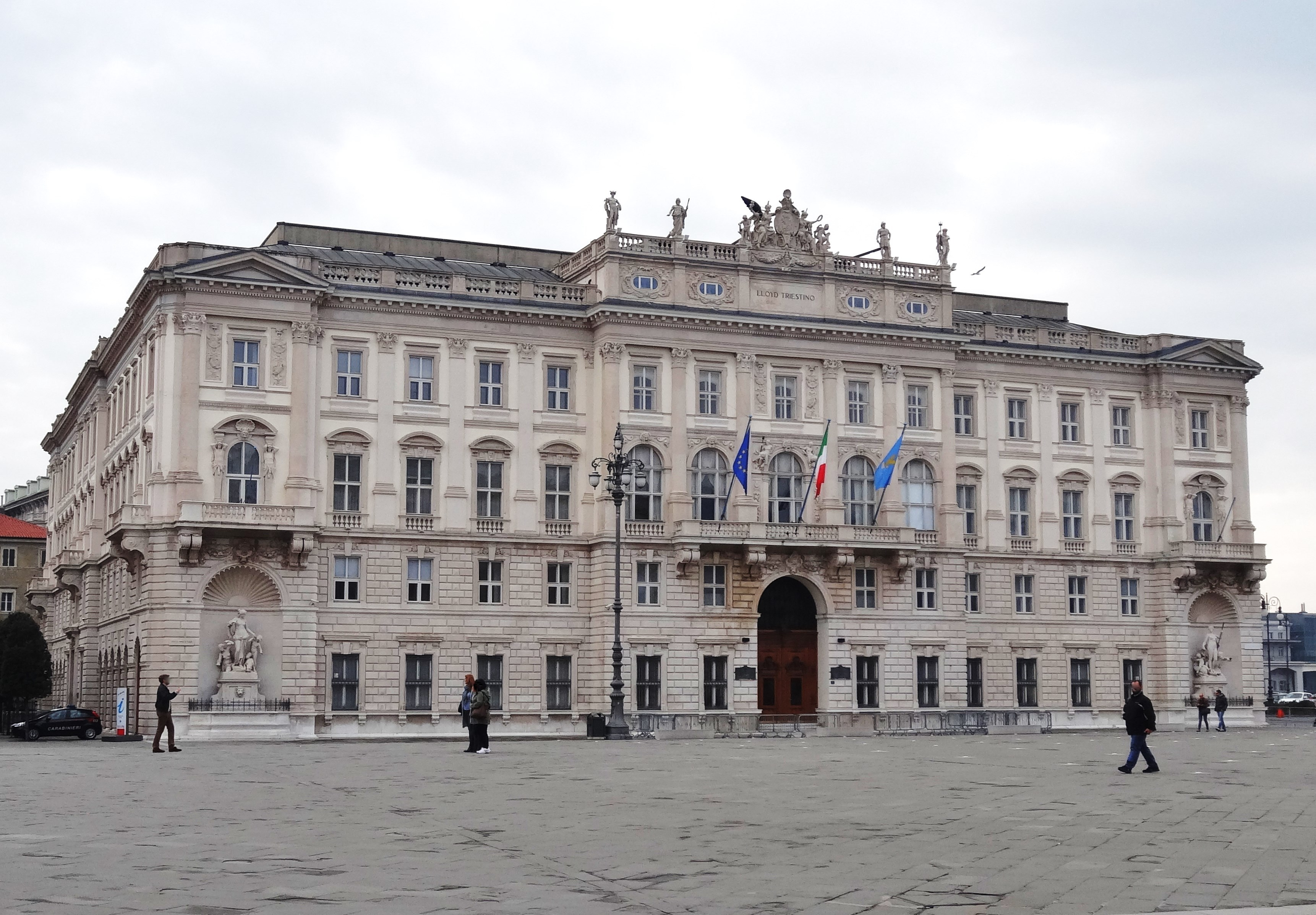 Triest, Palazzo del Lloyd Triestino auf der Piazza dell'Unità d'Italia